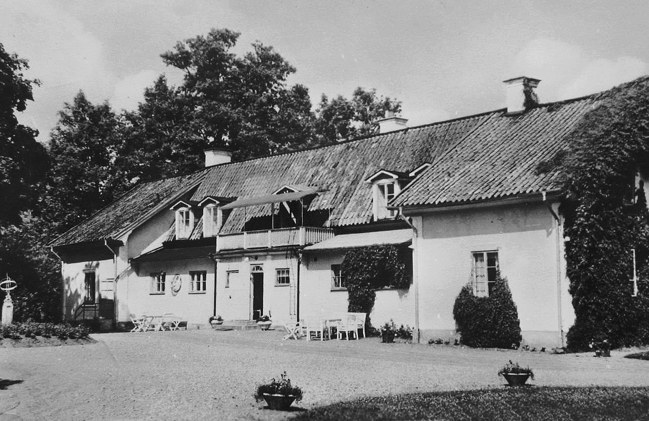 Duveholms herrgård fasad mot innergården